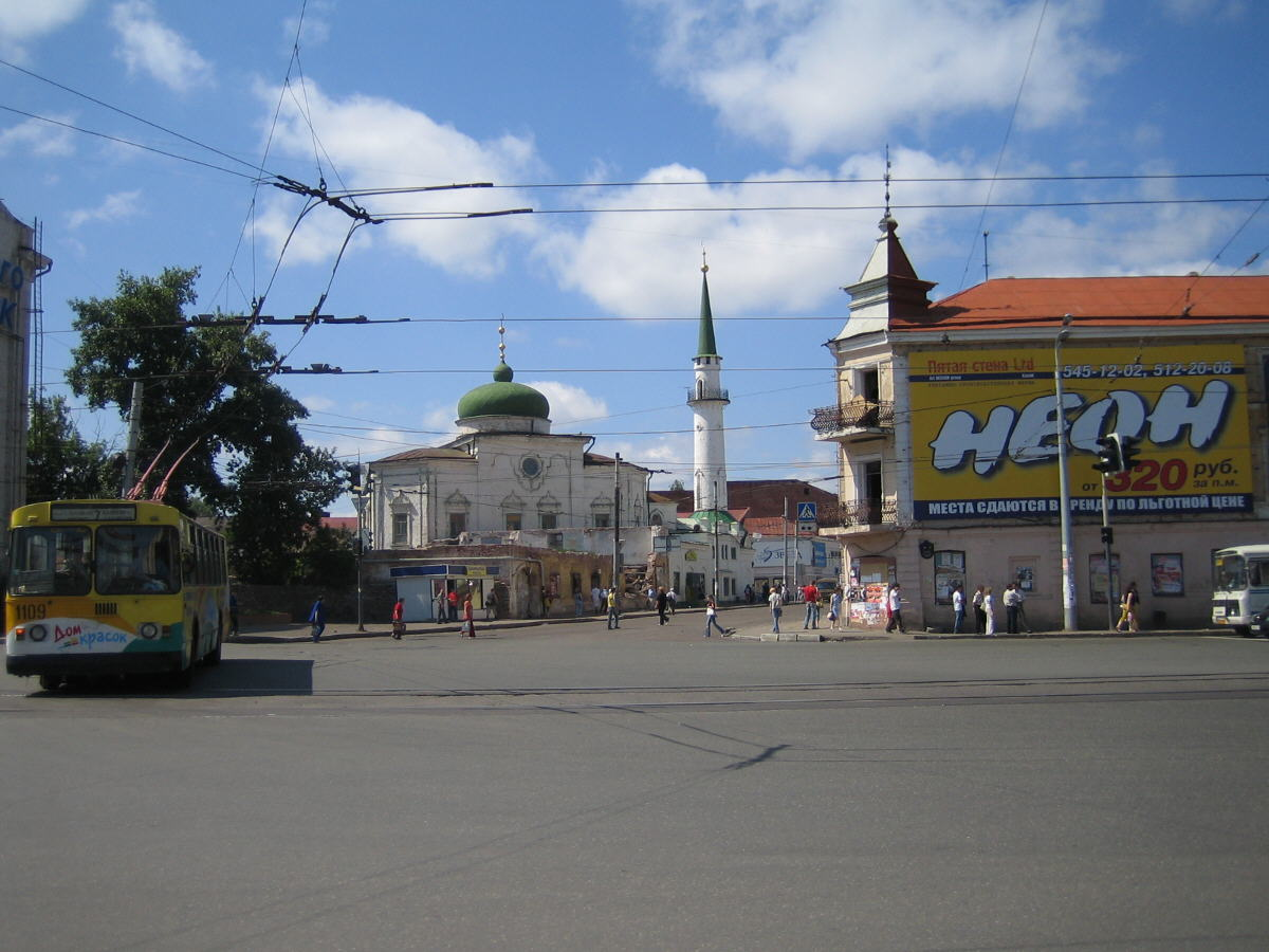 Соборная мечеть (ул. Кирова) (19.06.06)